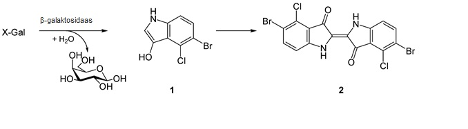 X-gali hüdrolüüs beta-galaktosidaasi katalüüsil